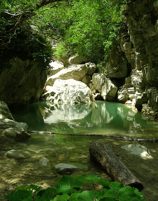 De kloof van de Salinello in het Montagna dei Fiori categorie:Afbeelding Abruzzen